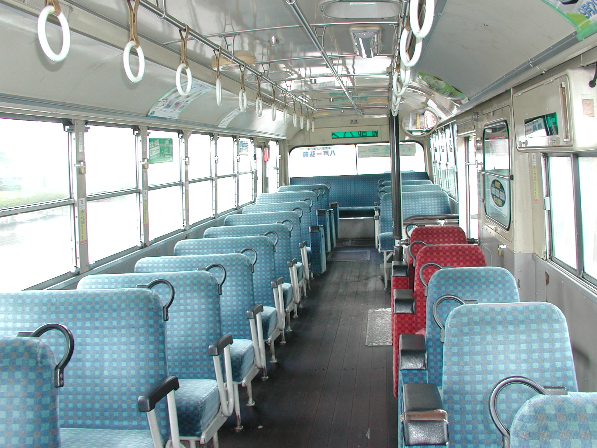 いすゞ・C系：K-CJM550（元：京浜急行電鉄→現所有者：南部バス）：車内・座席